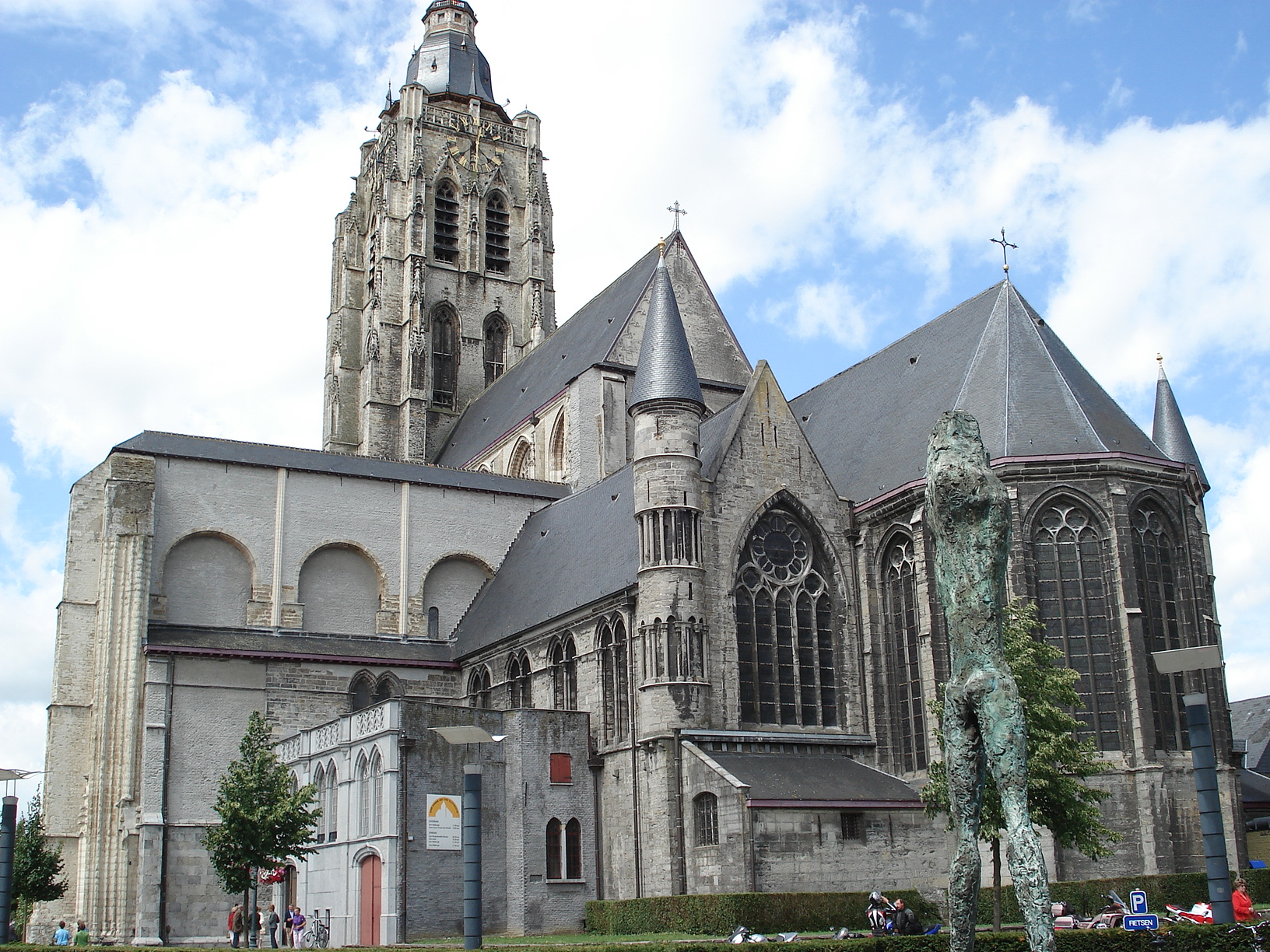 Sint-Walburgakerk te Oudenaarde (België).